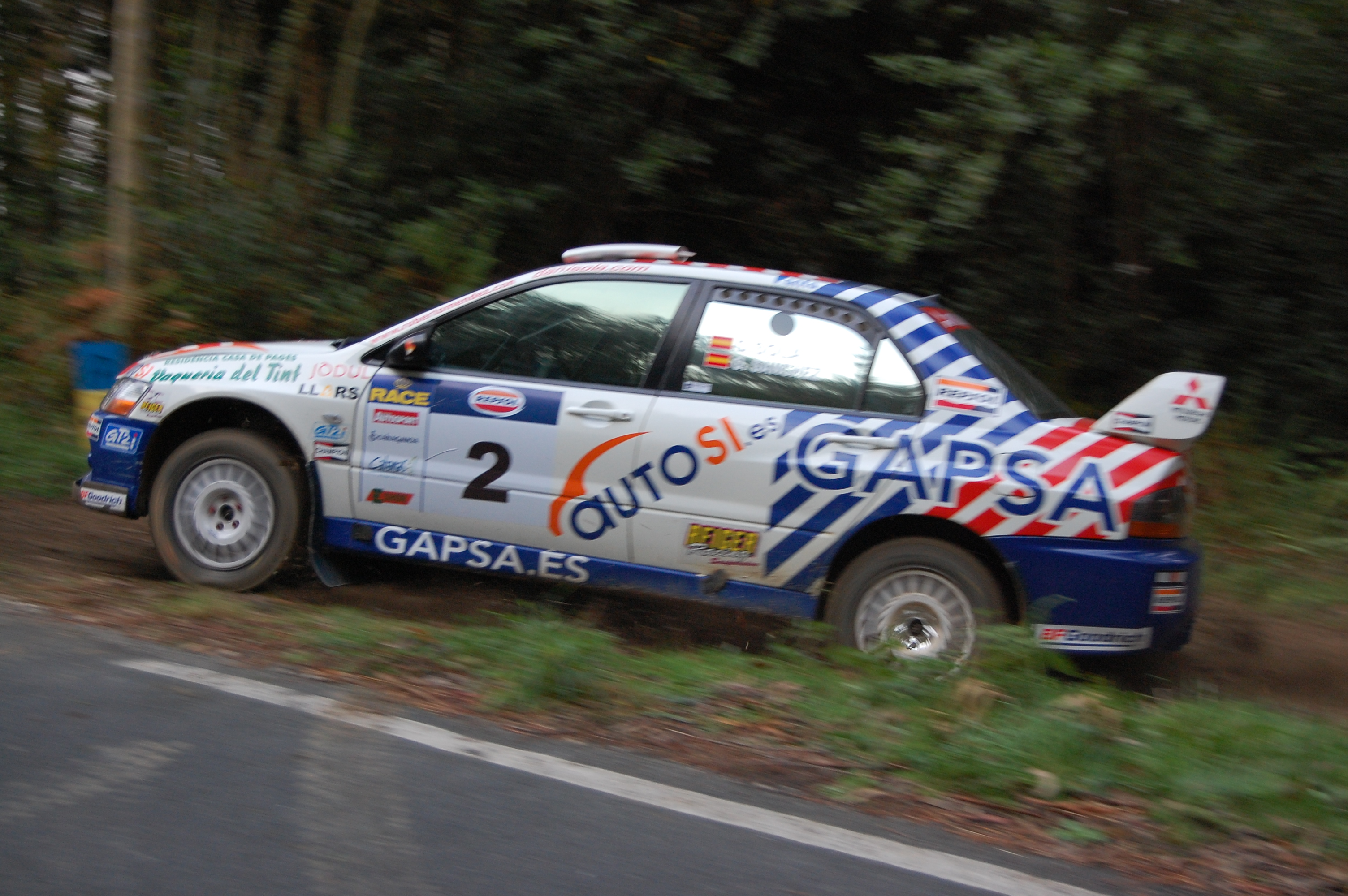 Rally de Cabanas. Campeonato de España de rallyes de tierra.